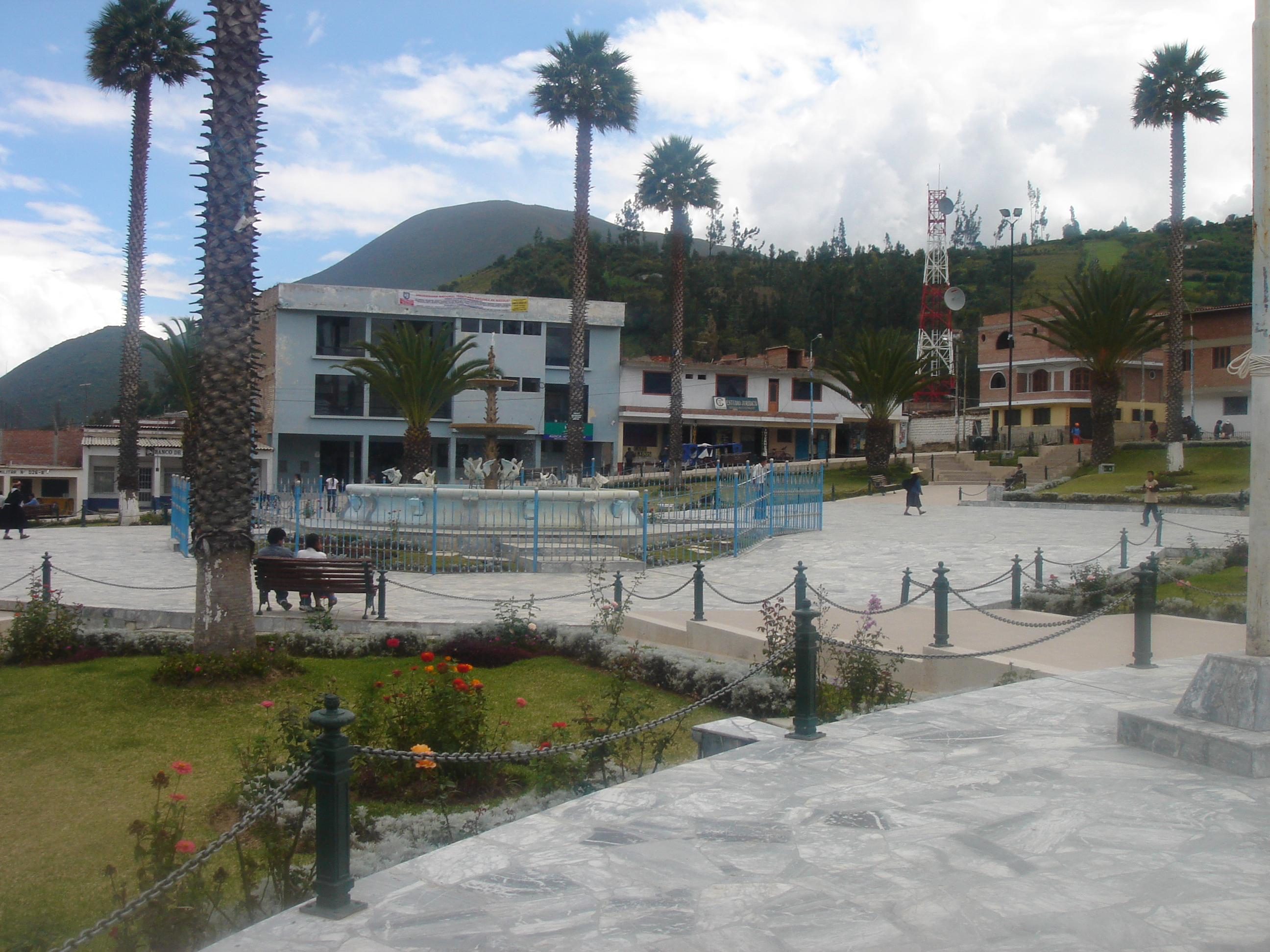 Plaza Central de Yungay - Ancash (PERU)